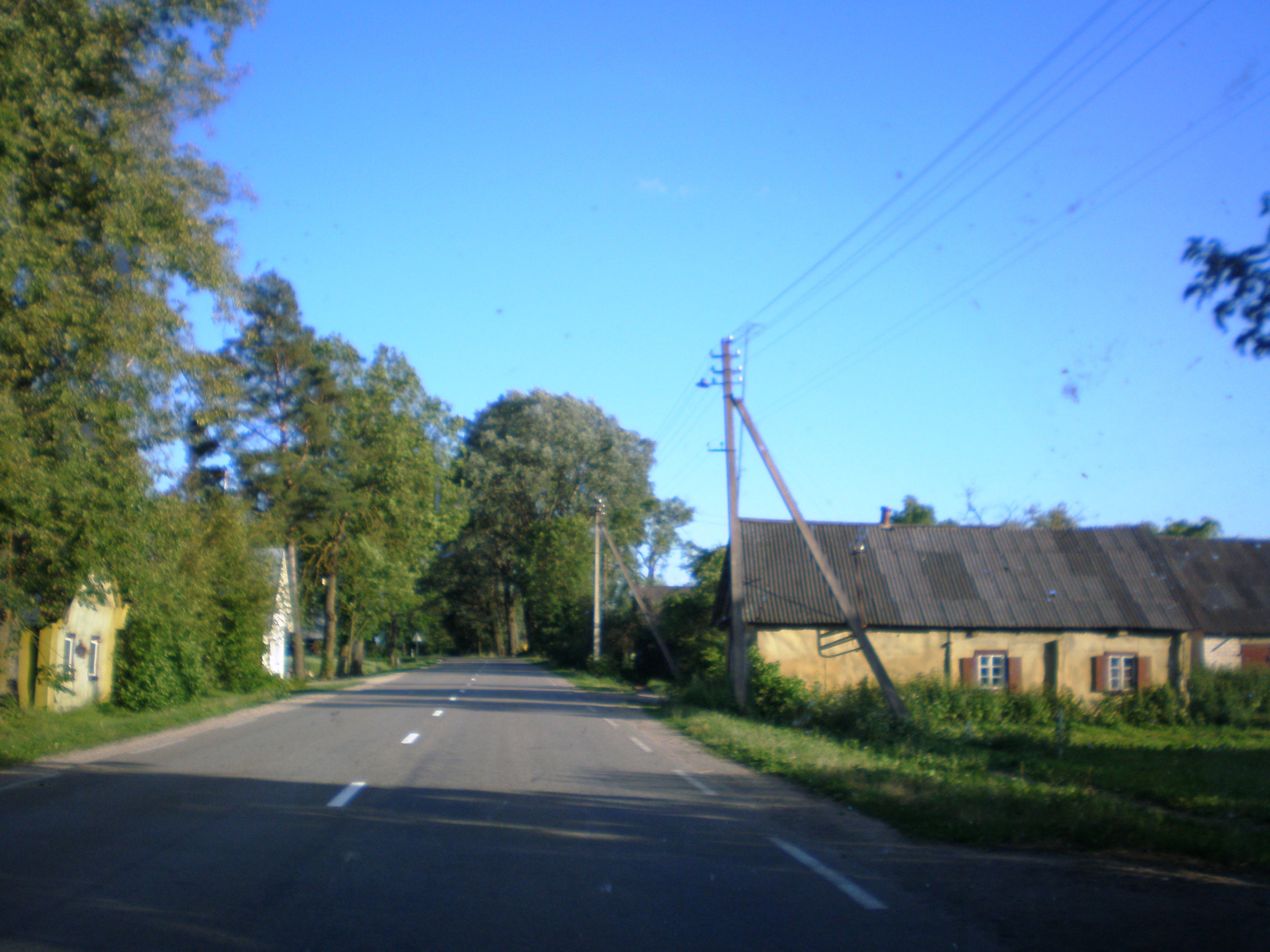 Kratiškiai, Biržų raj.